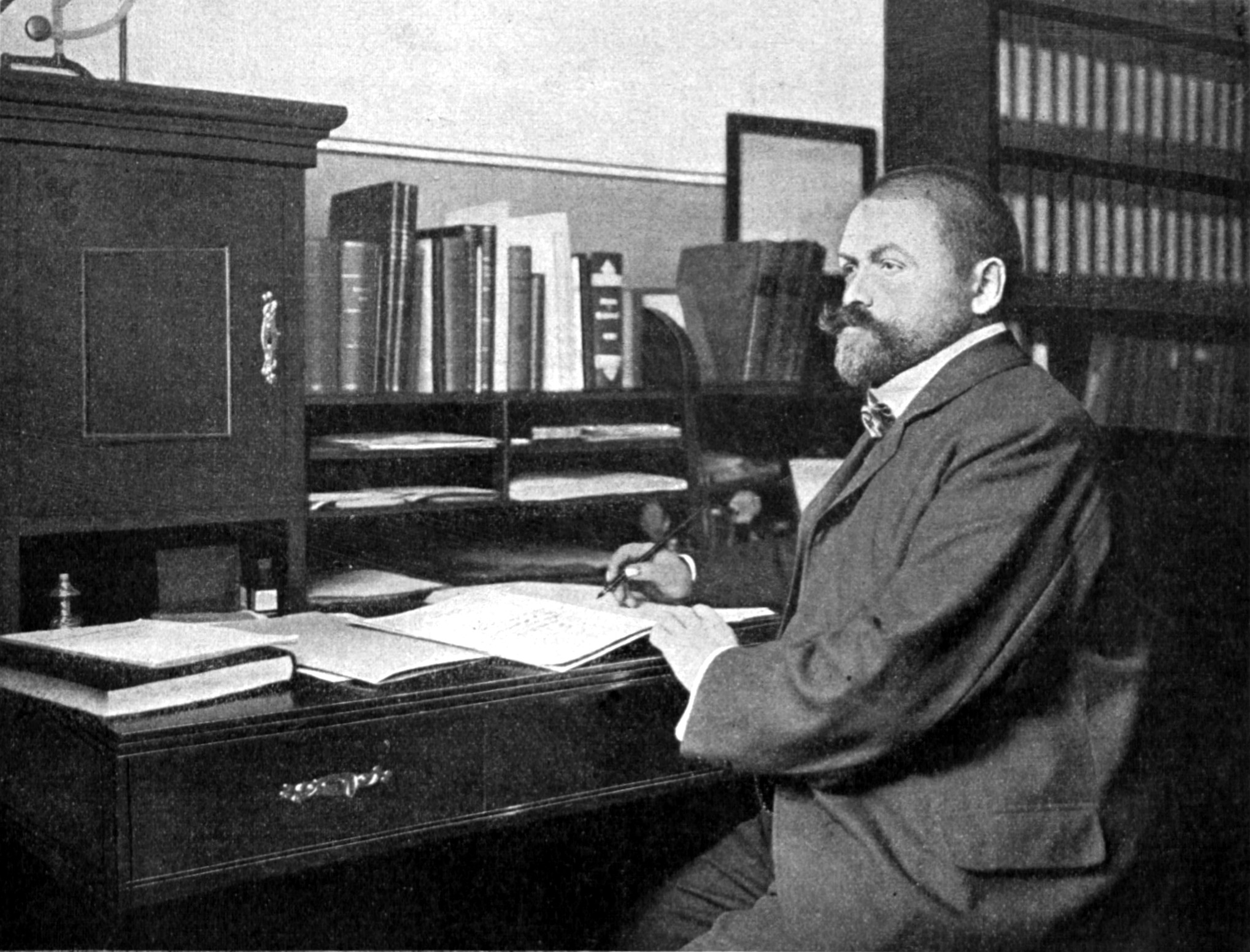 Dr. phil. R. F. A. Möbusz, Direktor des Lübecker Lehrer-Seminars seit 1903.